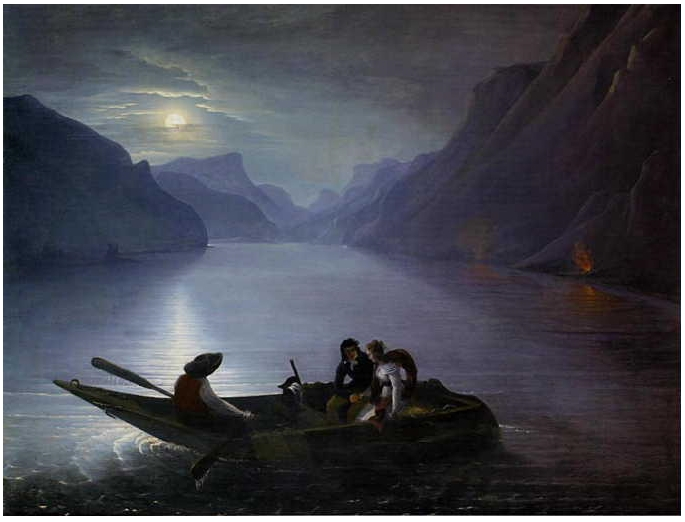 "Promenade de Julie et Saint-Preux sur le lac de Genève". Ce tableau fait allusion à la partie IV (lettre XVII) du roman épistolaire "Julie ou La Nouvelle Héloïse". Charles Édouard Le Prince, 1824, Musée Jean-Jacques Rousseau de Montmorency.